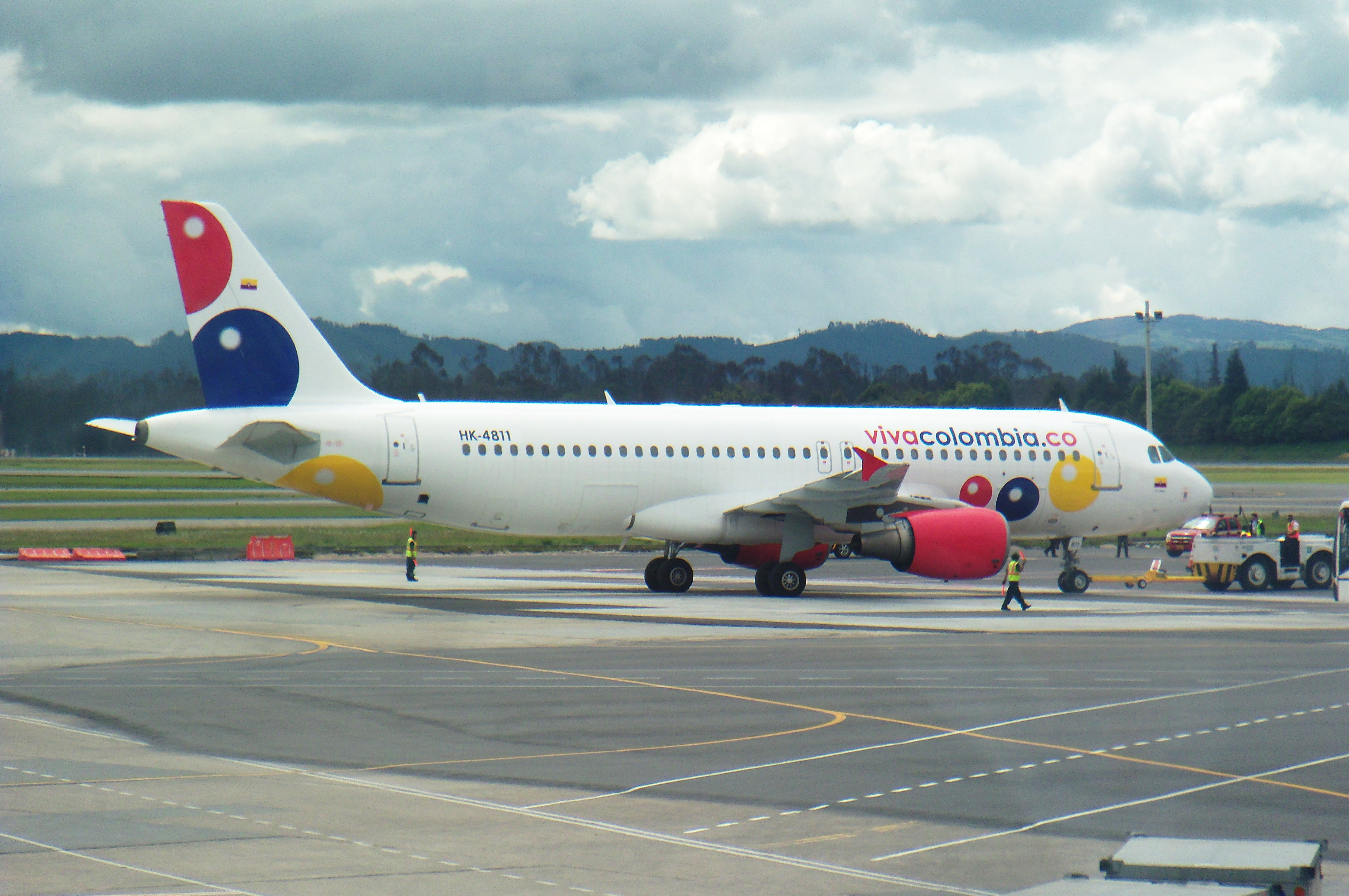 Primer vuelo al aeropuerto internacional Eldorado.